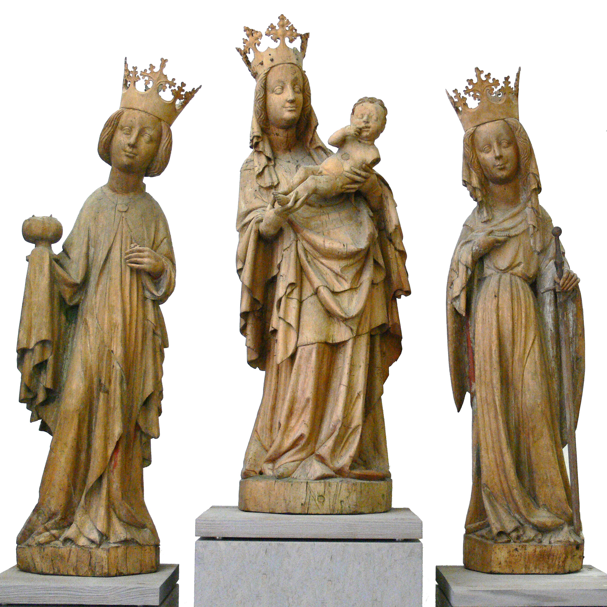 Muttergottes, Hl. Oswald und Hl. Katharina Bodenseegebiet, ca. 1410-1420 Weidenholz, ursprünglich gefasst, jetzt holzsichtig Ursprünglich in Pfärrich (heute zu Amtzell), Landkreis Ravensburg, jetzt: Württembergisches Landesmuseum Stuttgart